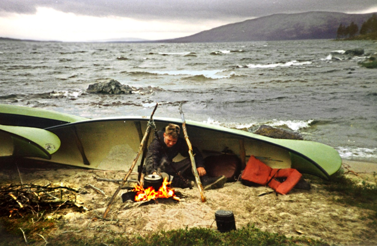 Femund-See (Norwegen) bei Sturm. Kanufahrer im Windschutz.